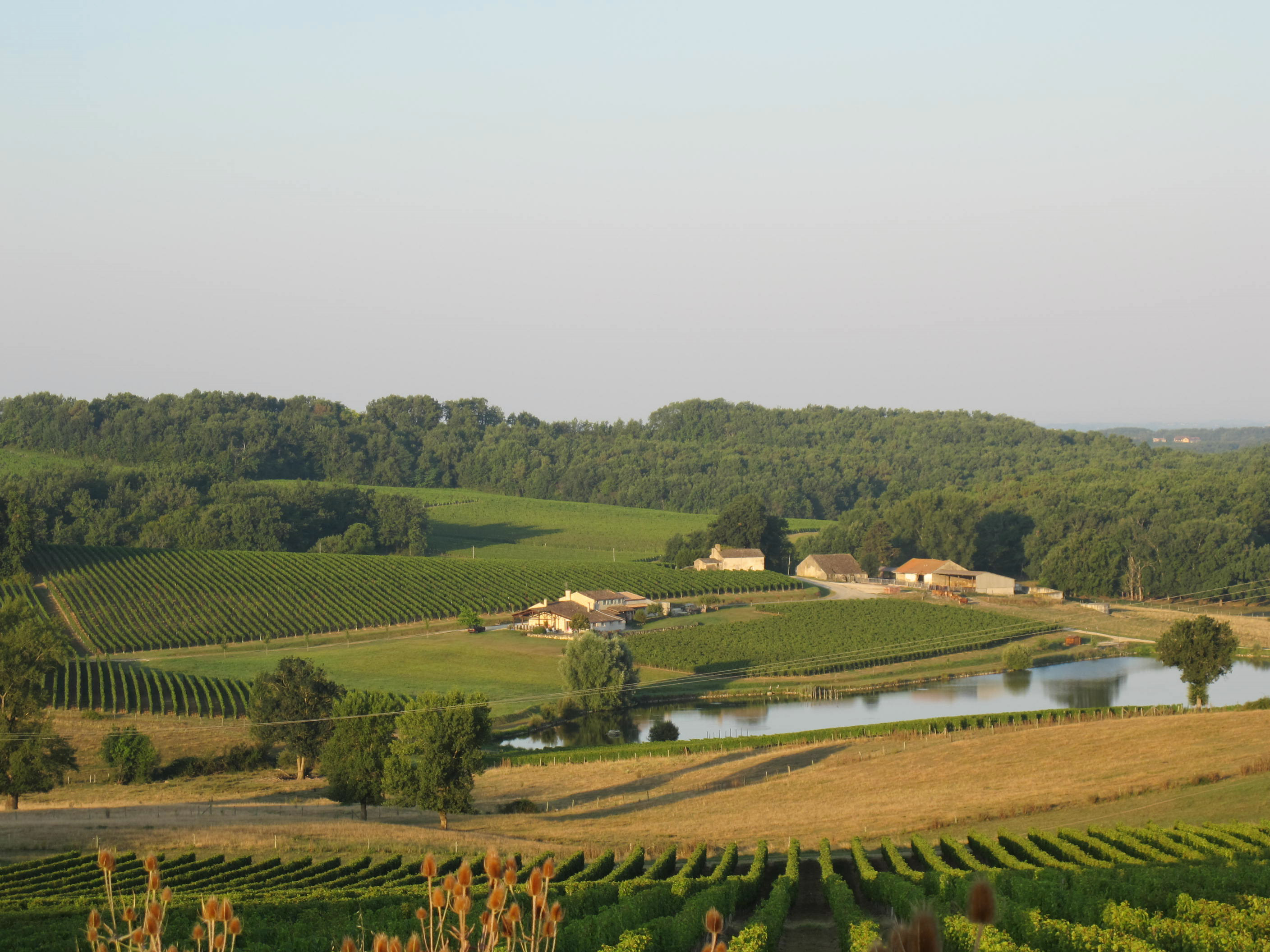 Pique Sègue: vue plongeante Jampeau